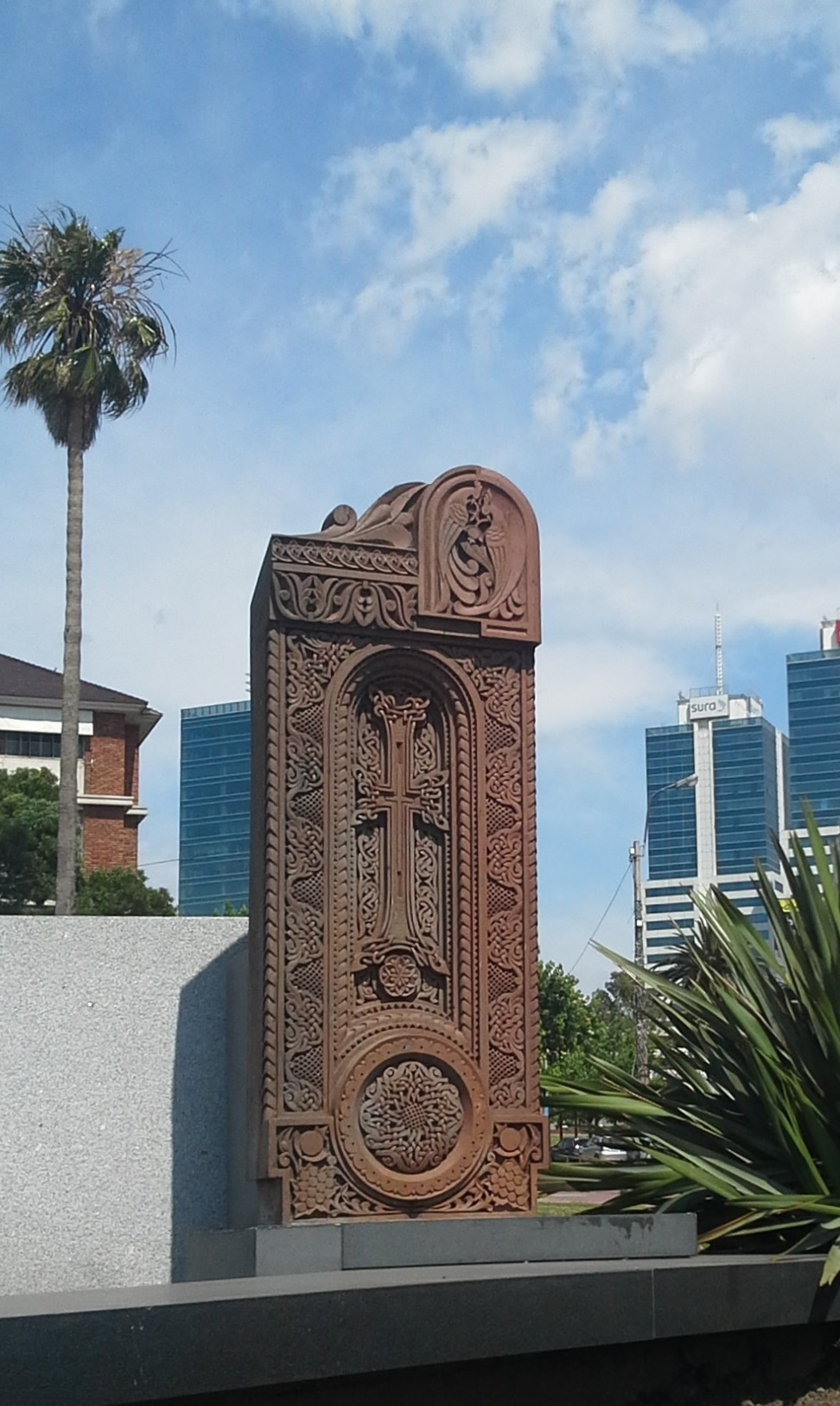 Khachkar (Armenian stone cross) at the Rambla of Montevideo.